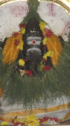 ஆலயத்தின் மூல விநாயகர்